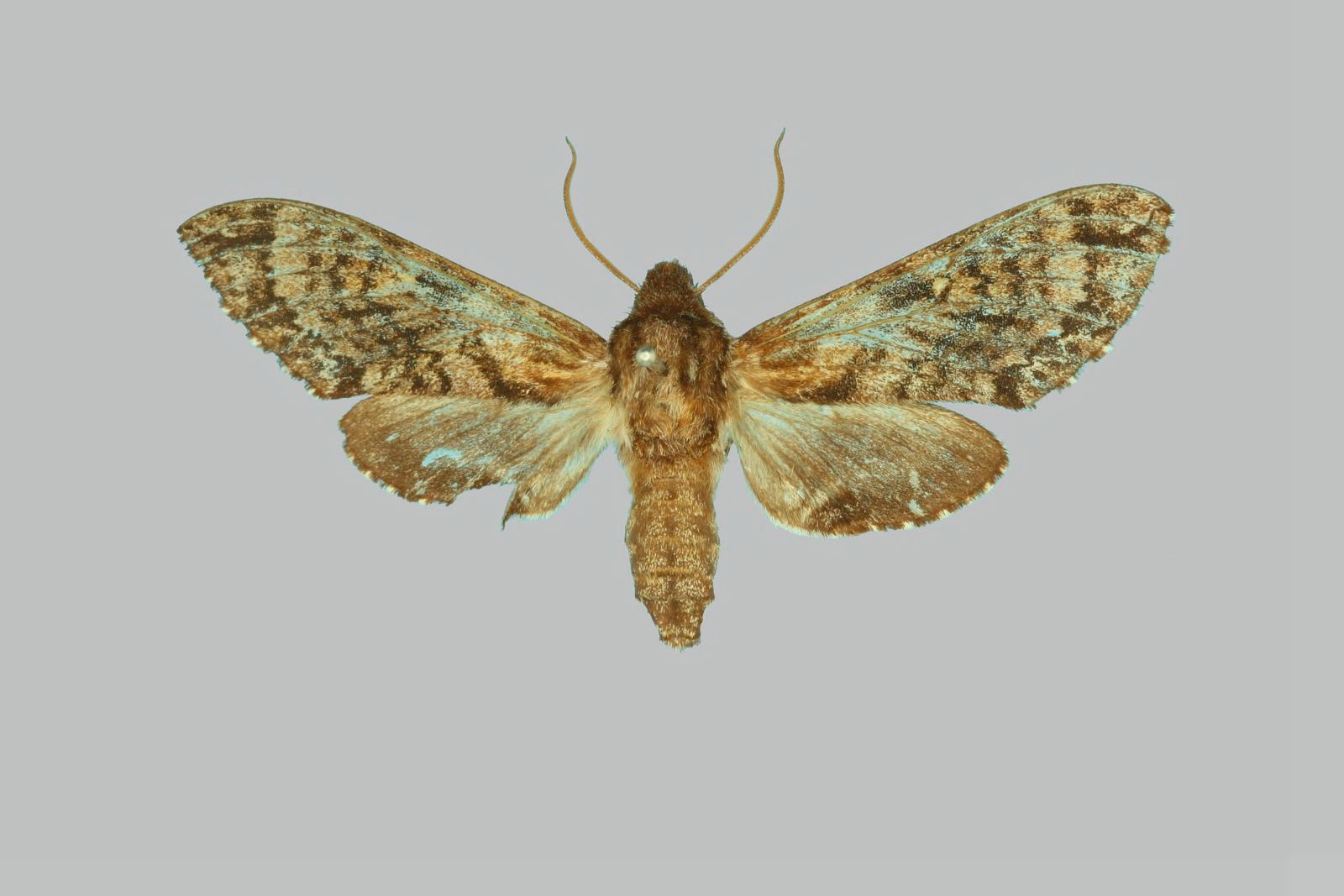 Dolbogene hartwegii, female, upperside.